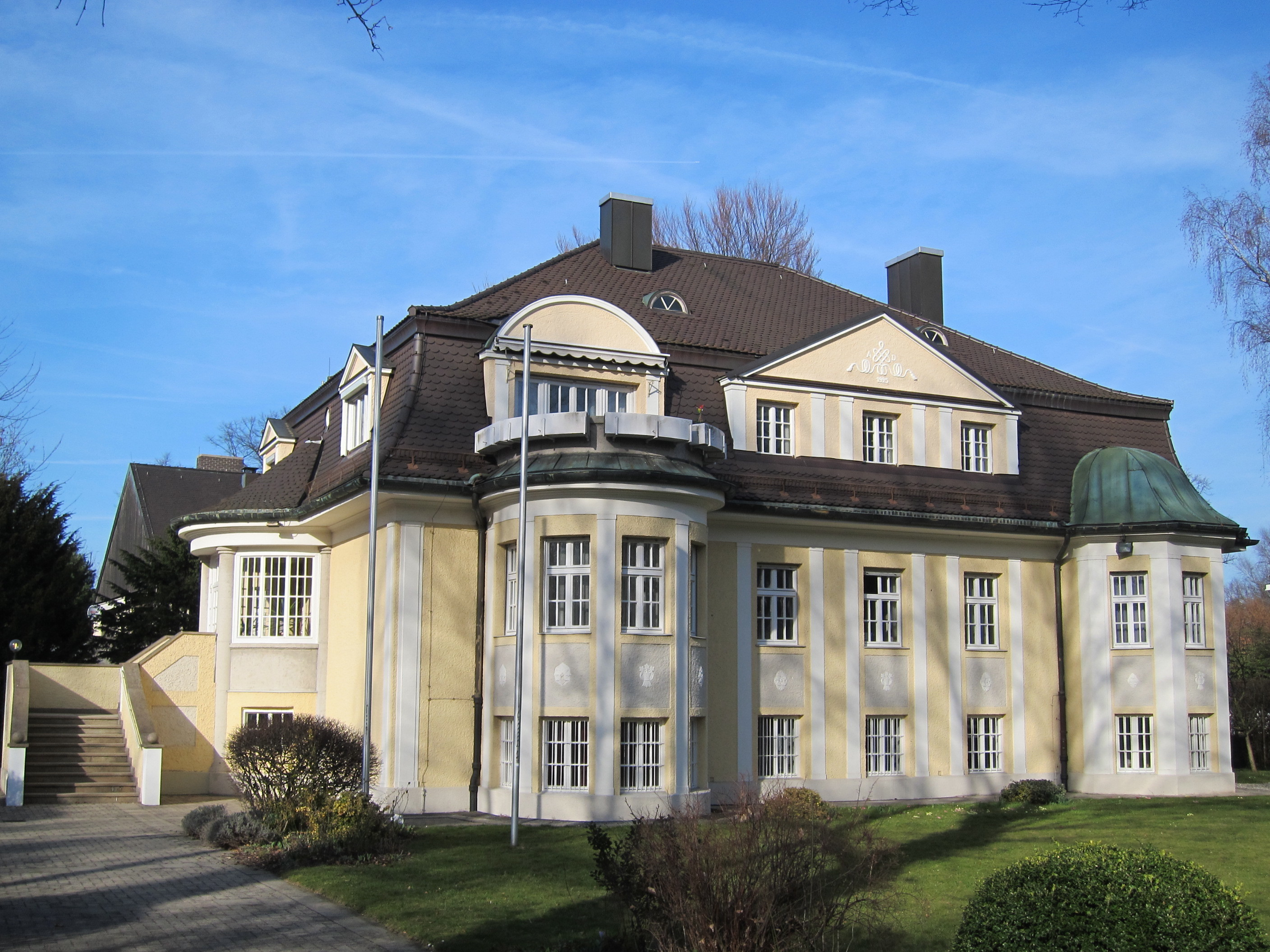 Donaustraße 5; Barockisierende Mansarddachvilla, bez. 1925.